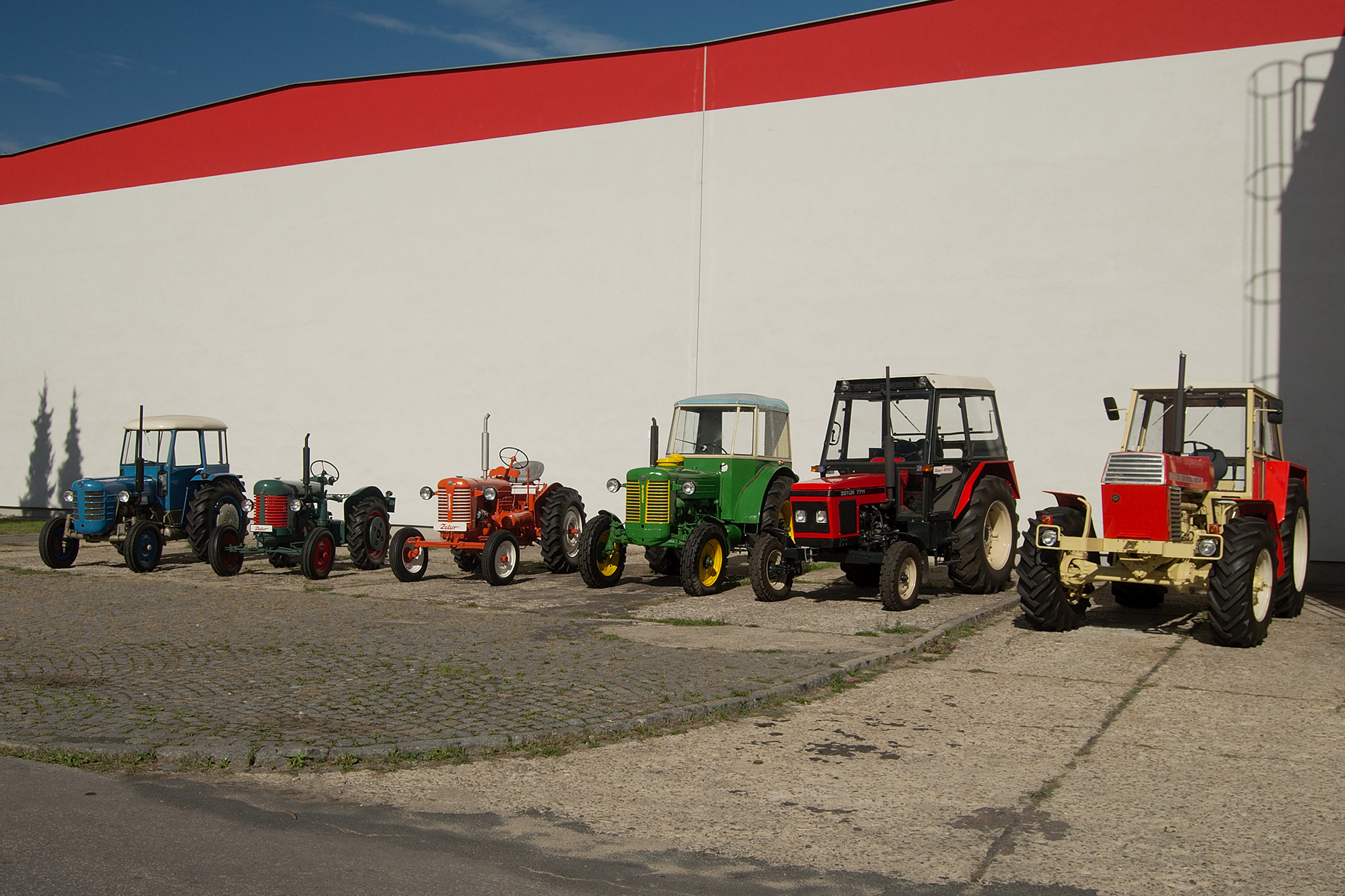 Muzeální sbírka traktorů Zetor, patřící společnosti Zetor Tractors, občas vystavovaná návštěvníkům